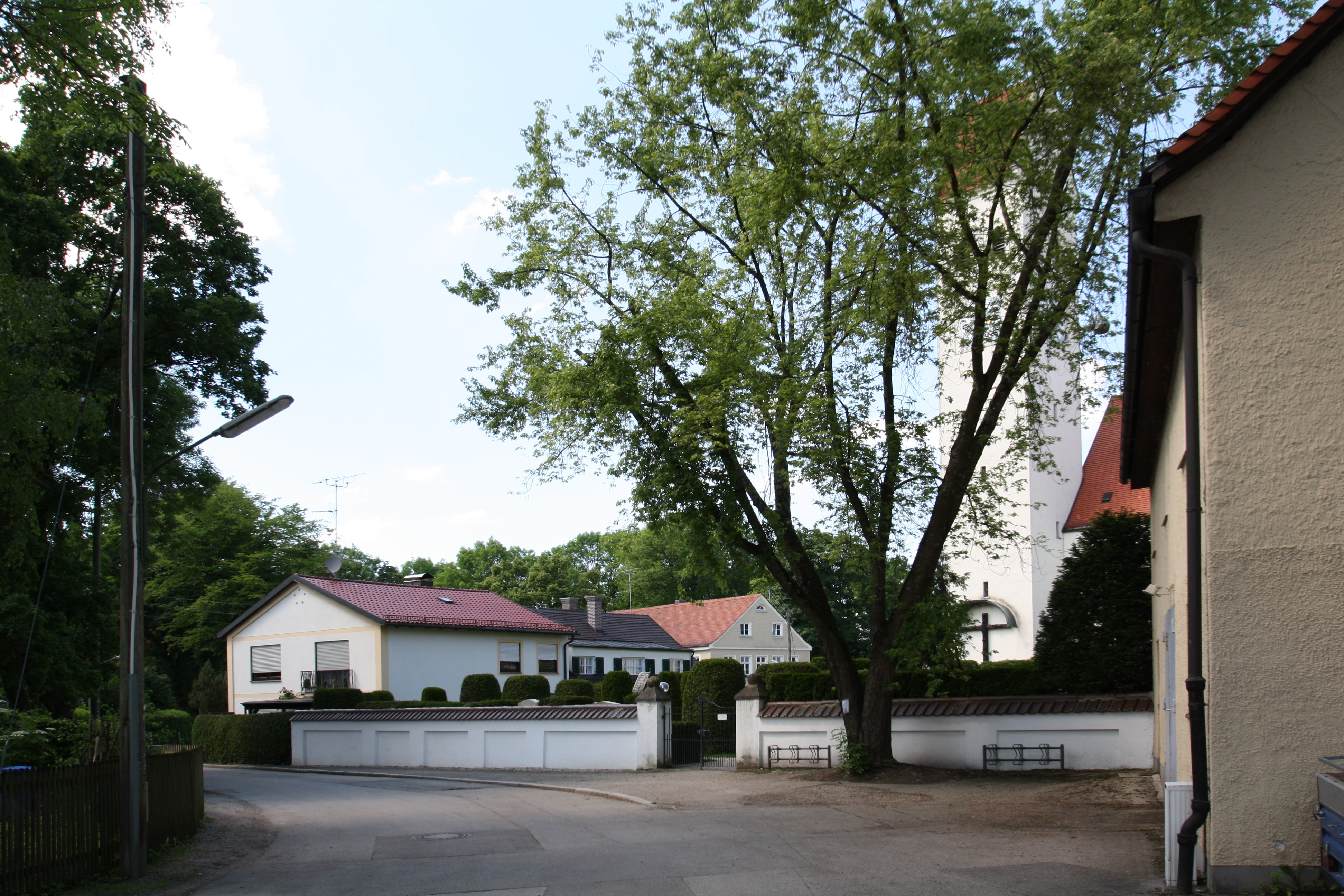 Muspillistraße, Oberföhring, München